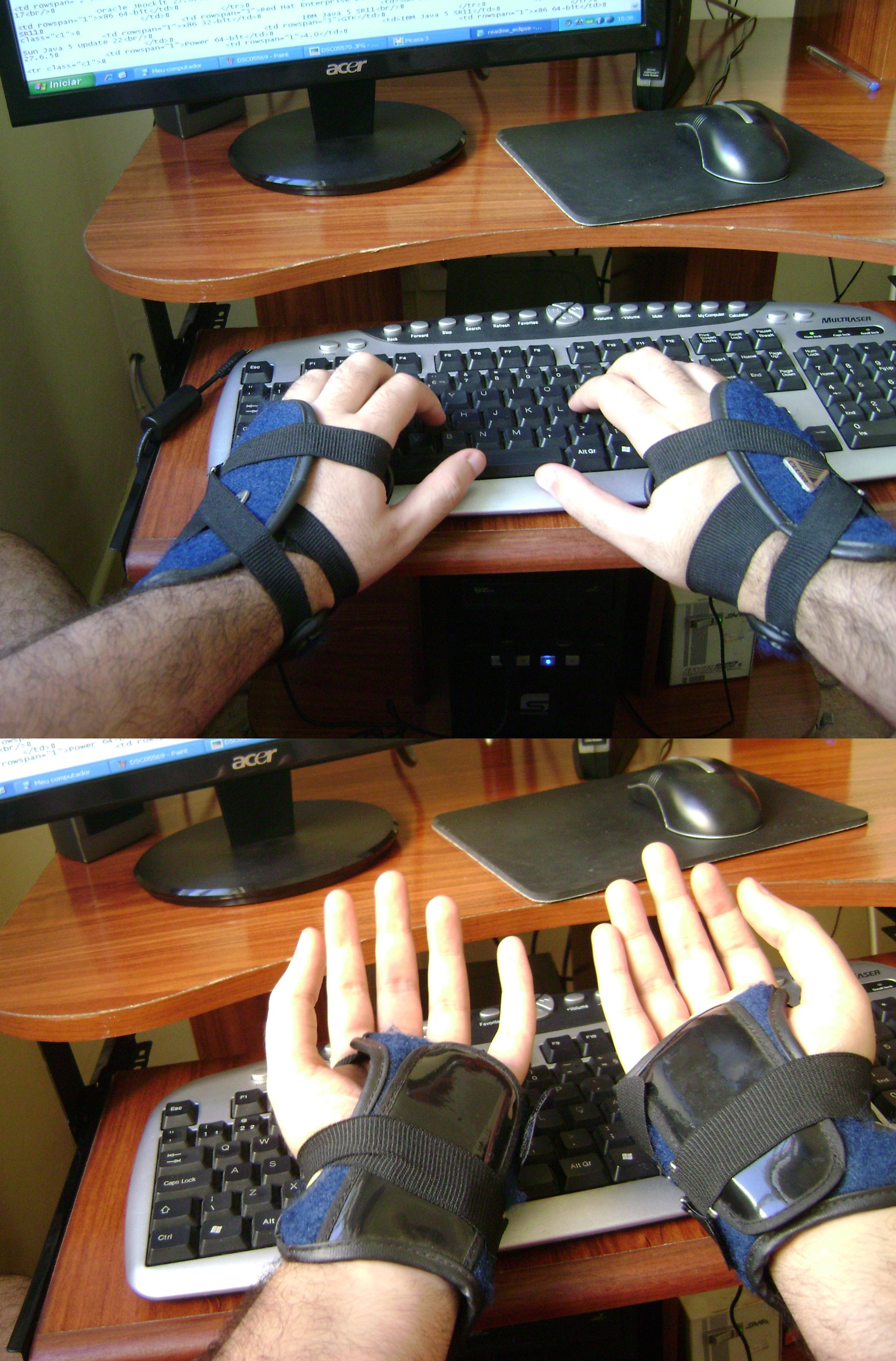 Luvas para digitação, com a intenção de se evitar Lesão por Esforço Repetitivo (LER).